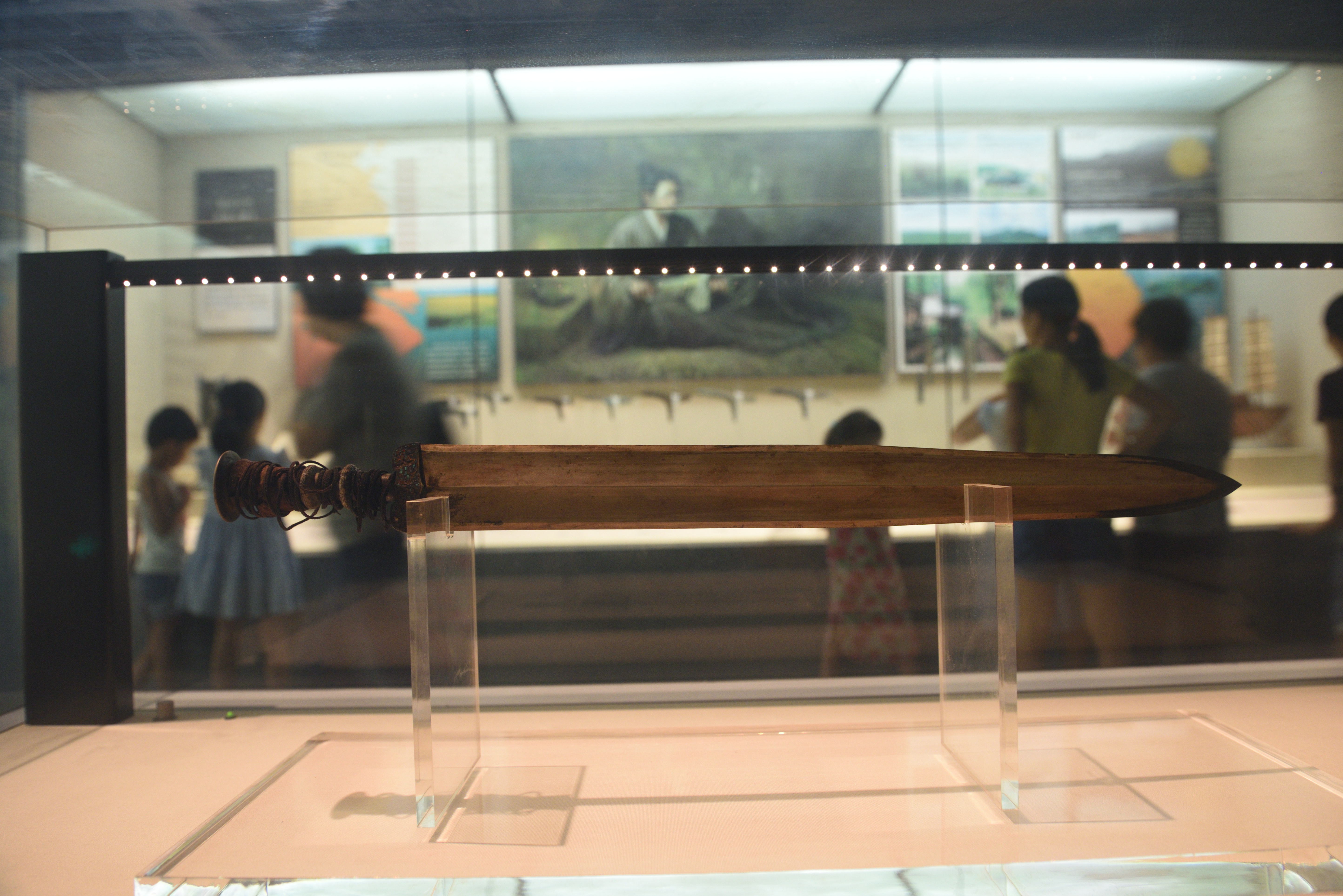 越王者旨於睗剑